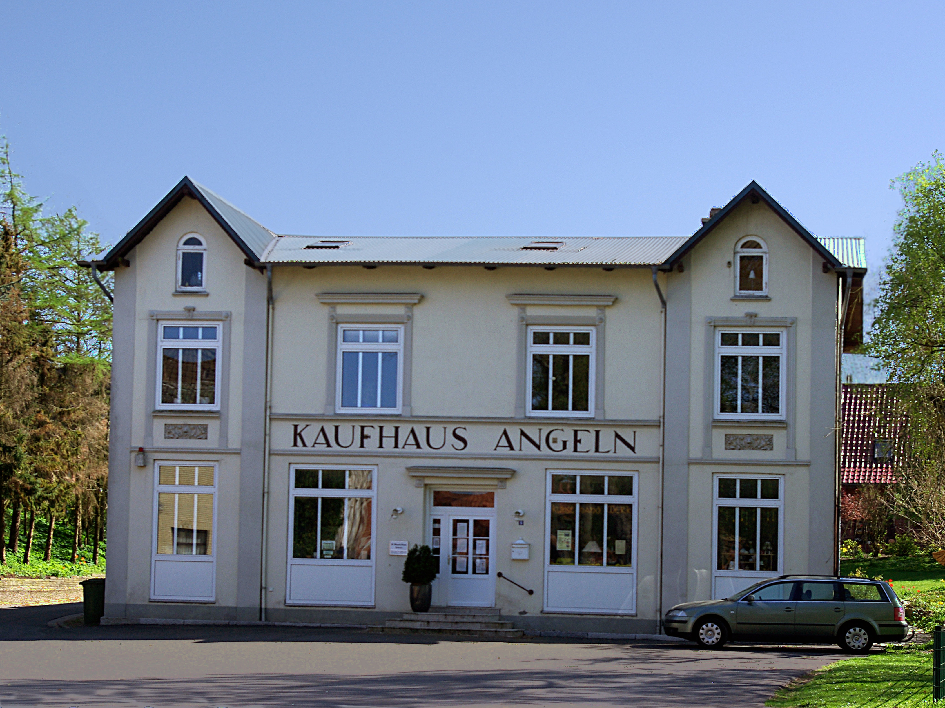 Sterup in Schleswig-Holstein. Das Kaufhaus Angeln befindet sich gegenüber der Kirche.